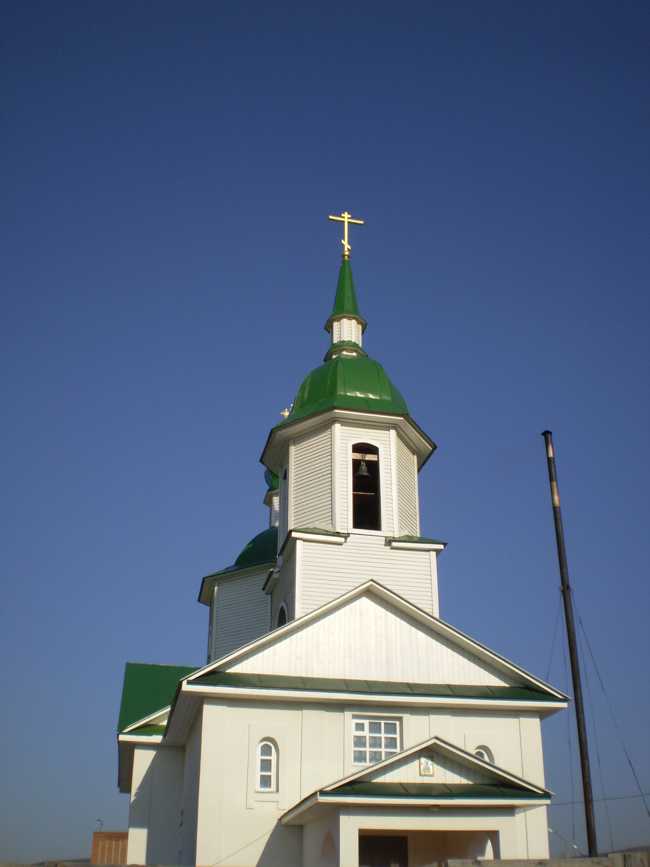 Церковь Покрова Пресвятой Богородицы в селе Мухоршибирь.